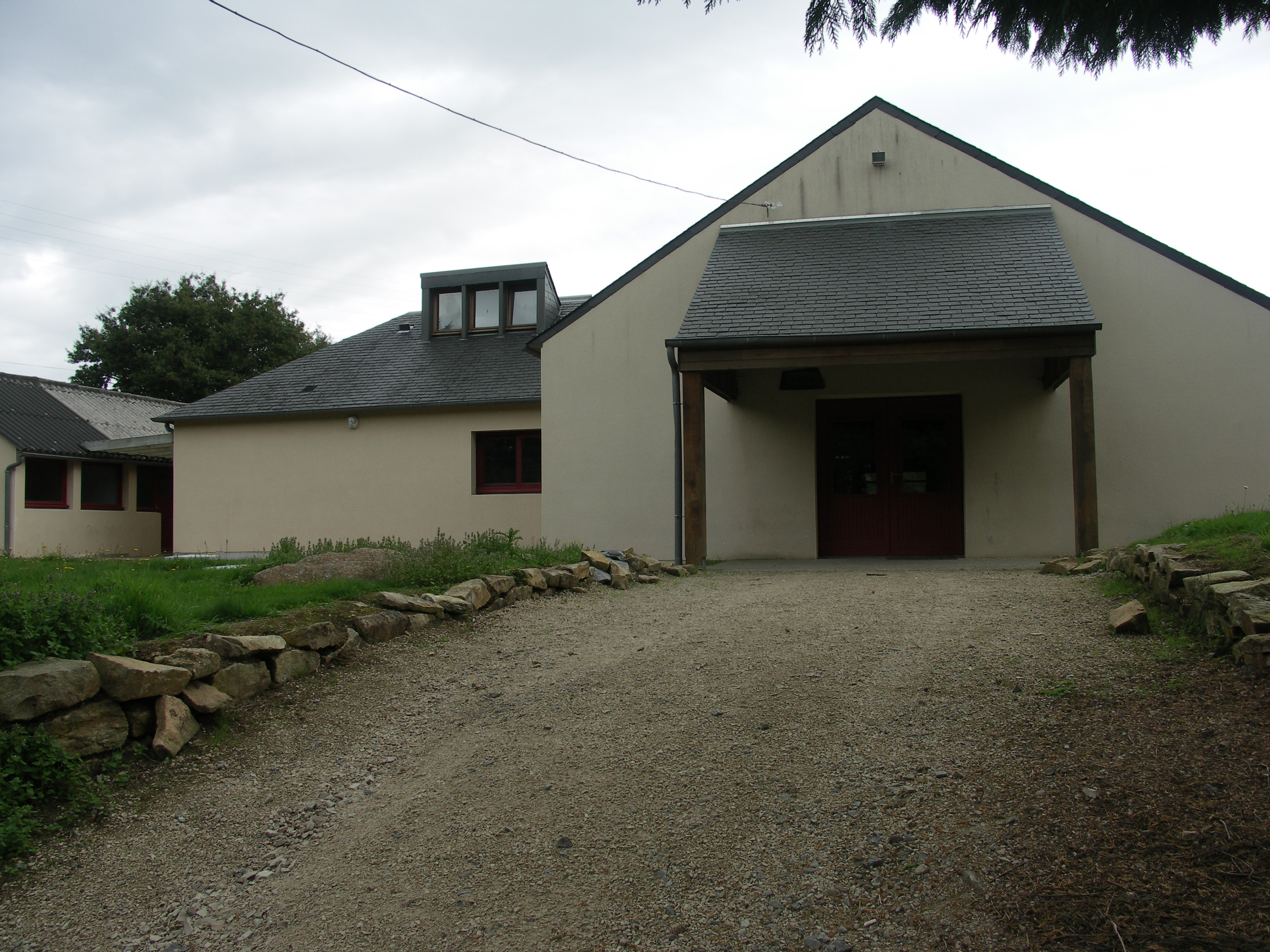 La salle comunale, baptisée du nom de Fanch Abgrall